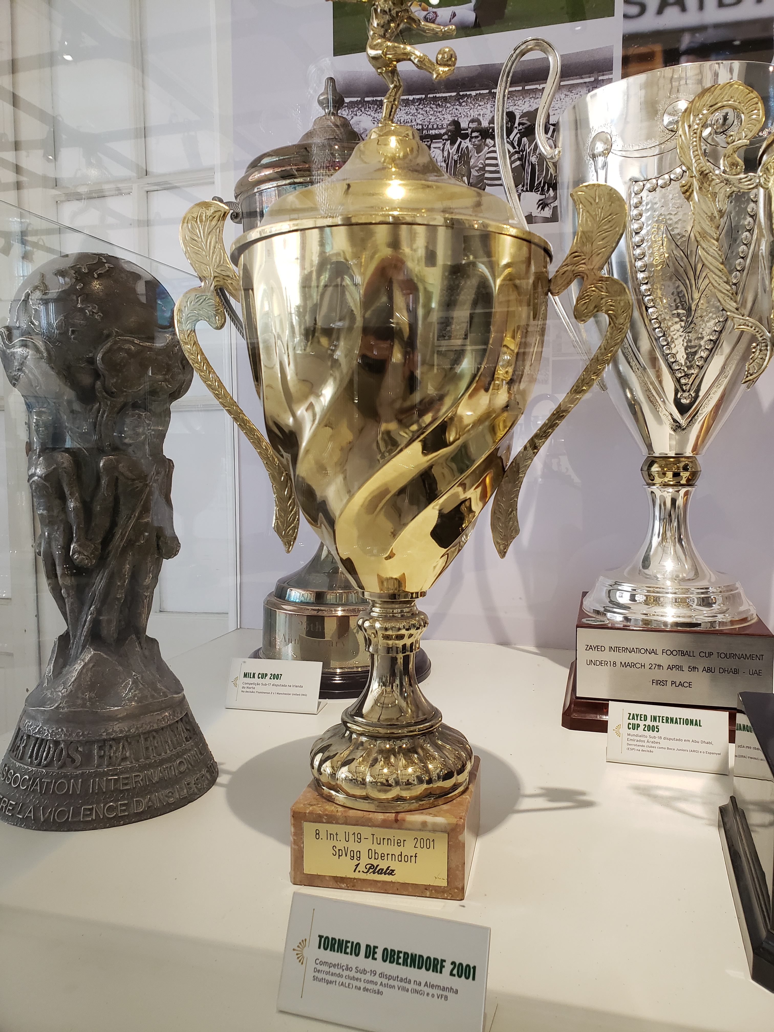 Torneio de Oberndorf Sub 20 2001 conquistado pelo Fluminense Football Club.